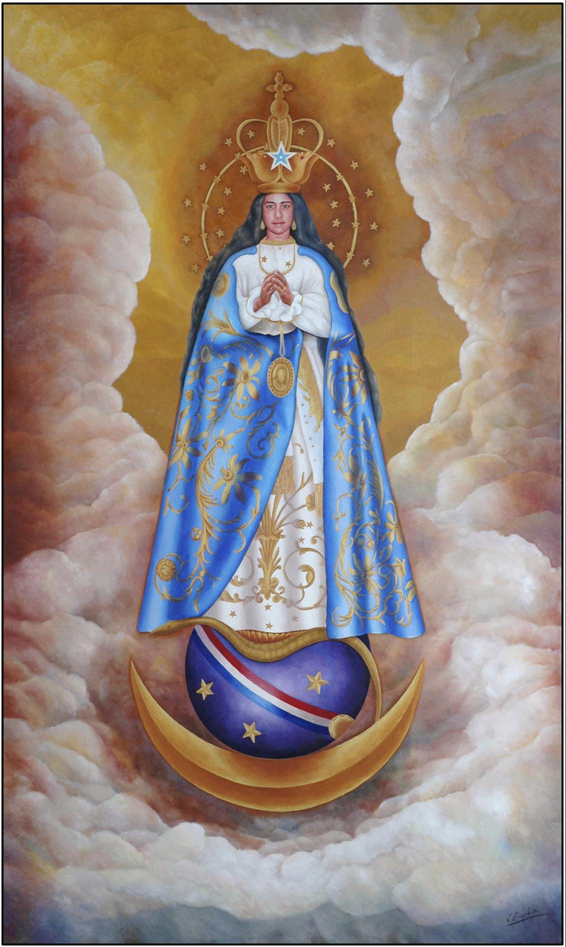 Virgen dieCaacupé, 193x400 cm. Políptico "Virgen de Caacupé"